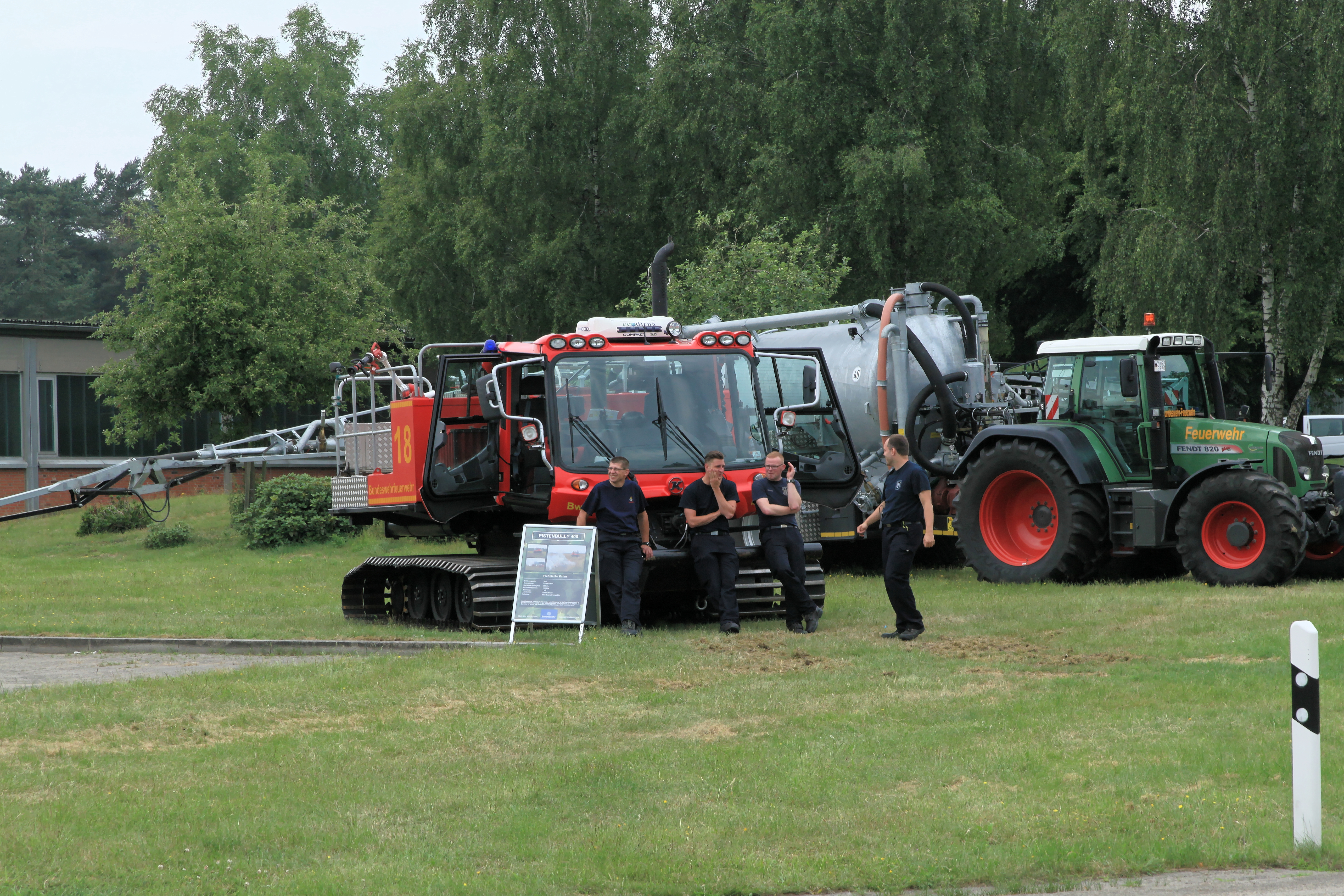 Kässbohrer Feuerlöschraupe Pistenbully 400 W beim Tag der Bundeswehr 2018 bei der Wehrtechnischen Dienststelle 91 in Meppen